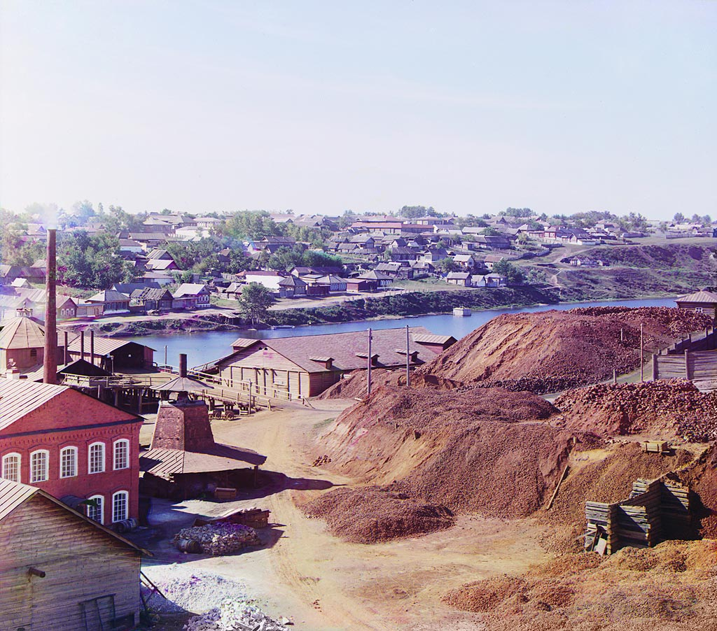 С. М. Прокудин-Горский. Вид на Каменский чугунно-плавильный завод. 1909 год